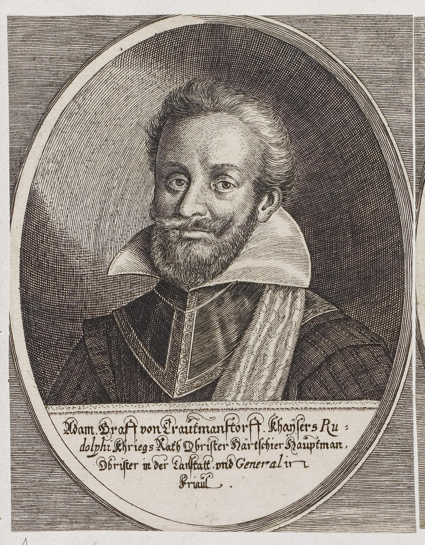 Grafik aus dem Klebeband Nr. 2 der Fürstlich Waldeckschen Hofbibliothek Arolsen Motiv: Adam von Trautmannsdorf (1579–1617), kaiserlicher Hofkriegsrat u. Kommandant der Militärgrenze gegen Kroatien